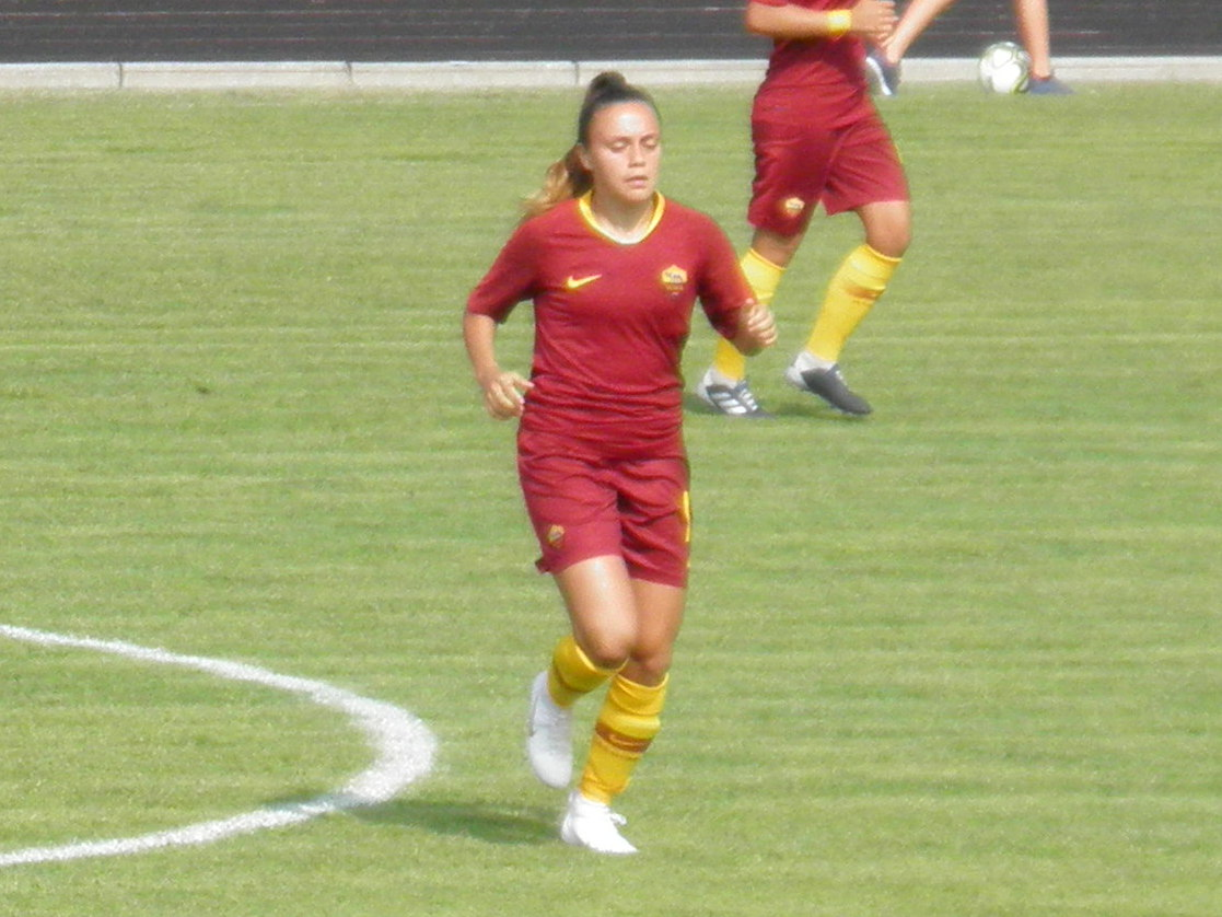 San Polo d'Enza, stadio comunale: Incontro tra il Sassuolo e la Roma, prima giornata di Serie A di calcio femminile della stagione 2018-2019.